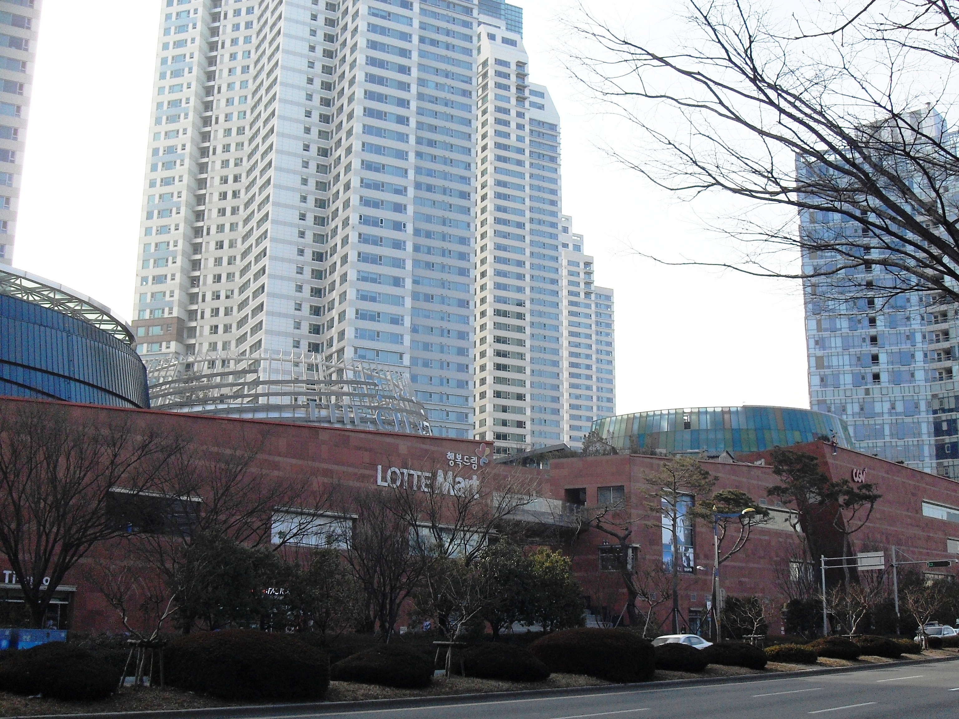 창원시 의창구에 위치한 더 시티 7